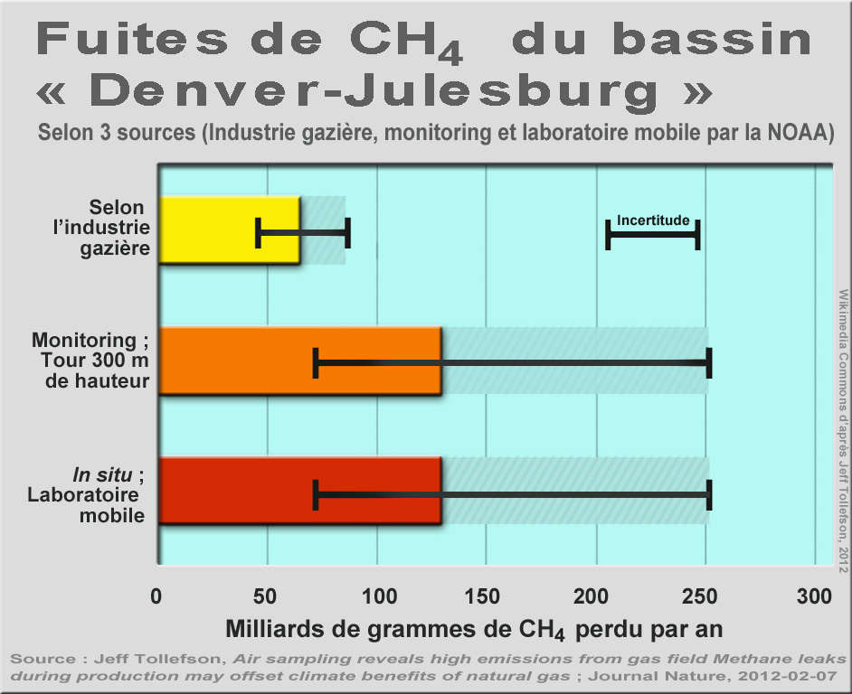 Estimations des émissions de gaz méthane perdues par le bassin gazier (gaz de schistes) de "Denver-Julesburg" (USA, près de Denver) ; par trois sources différentes (chiffres avancés par l'industrie gazière, 2) tour d'analyse de l'air (Denver) et laboratoire mobile). Selon la NOAA, les émissions ont été sous-estimées, au moins d'un facteur deux par rapport aux estimations de l'industrie et aux premières estimations de l'EPA.